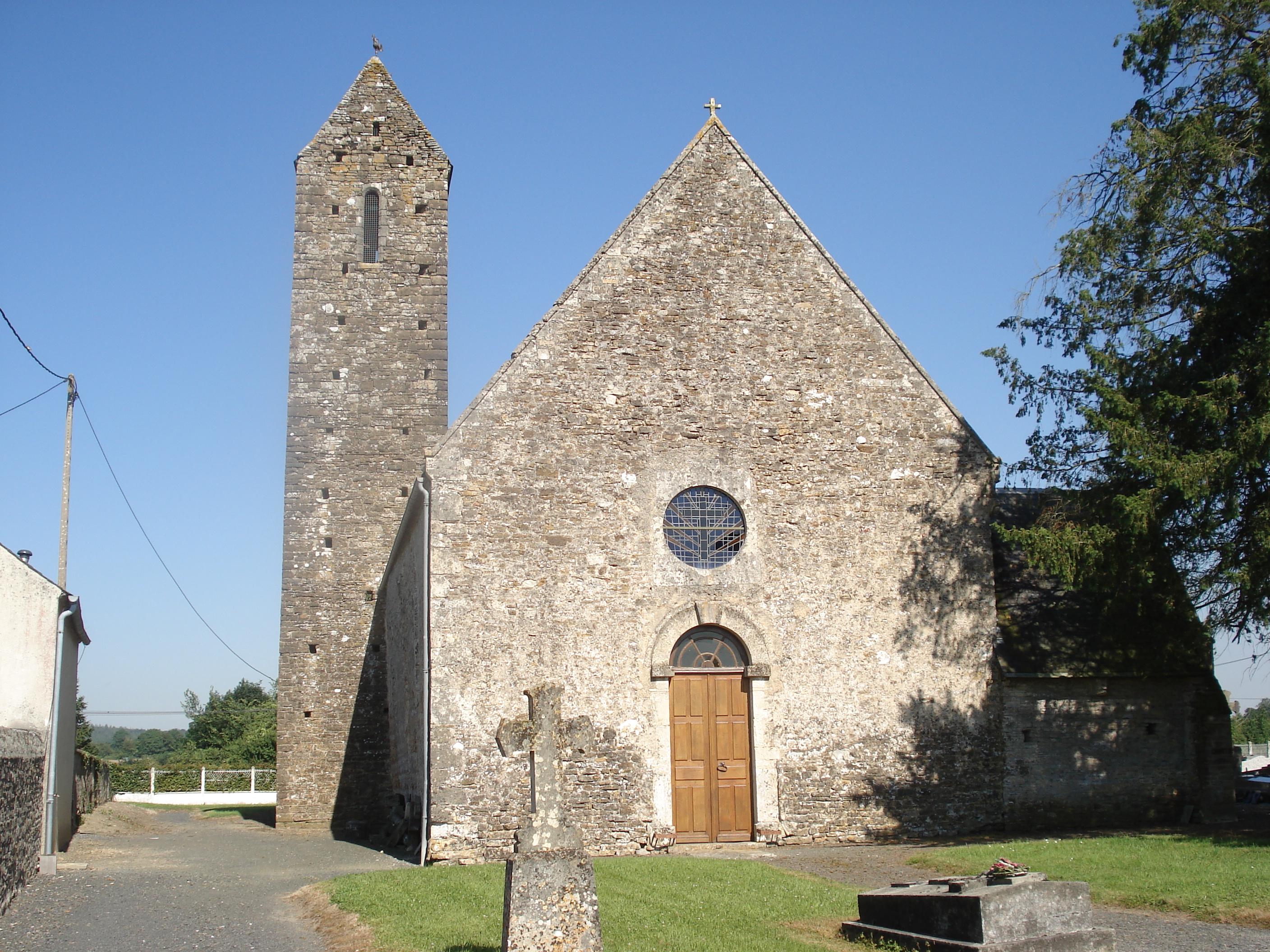 Église de Saint-Martin-de-Blagny